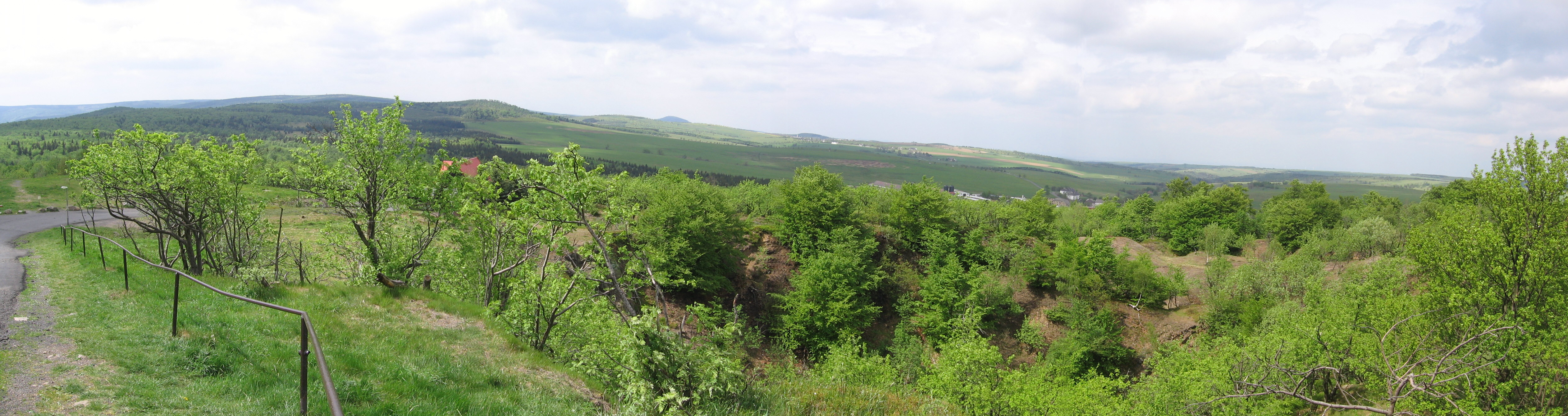 Blick vom Mückentürmchen / Komáří hůrka gen Westen. Rechts die flache Nordabdachung, links der steile Abfall ins Nordböhmische Becken.